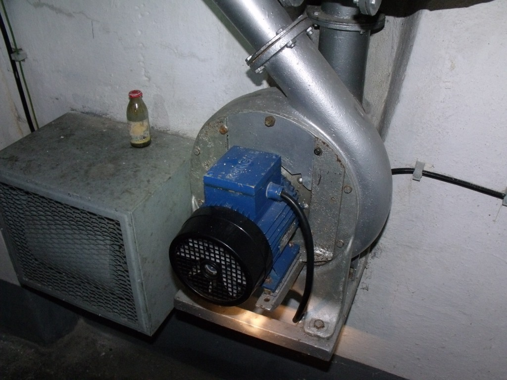 Ventilazione postazione con motore. Opera 22 Versciaco